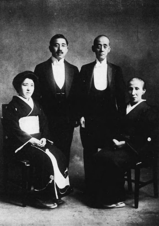 大沢善助と妻み保 徳太郎とその妻幸恵